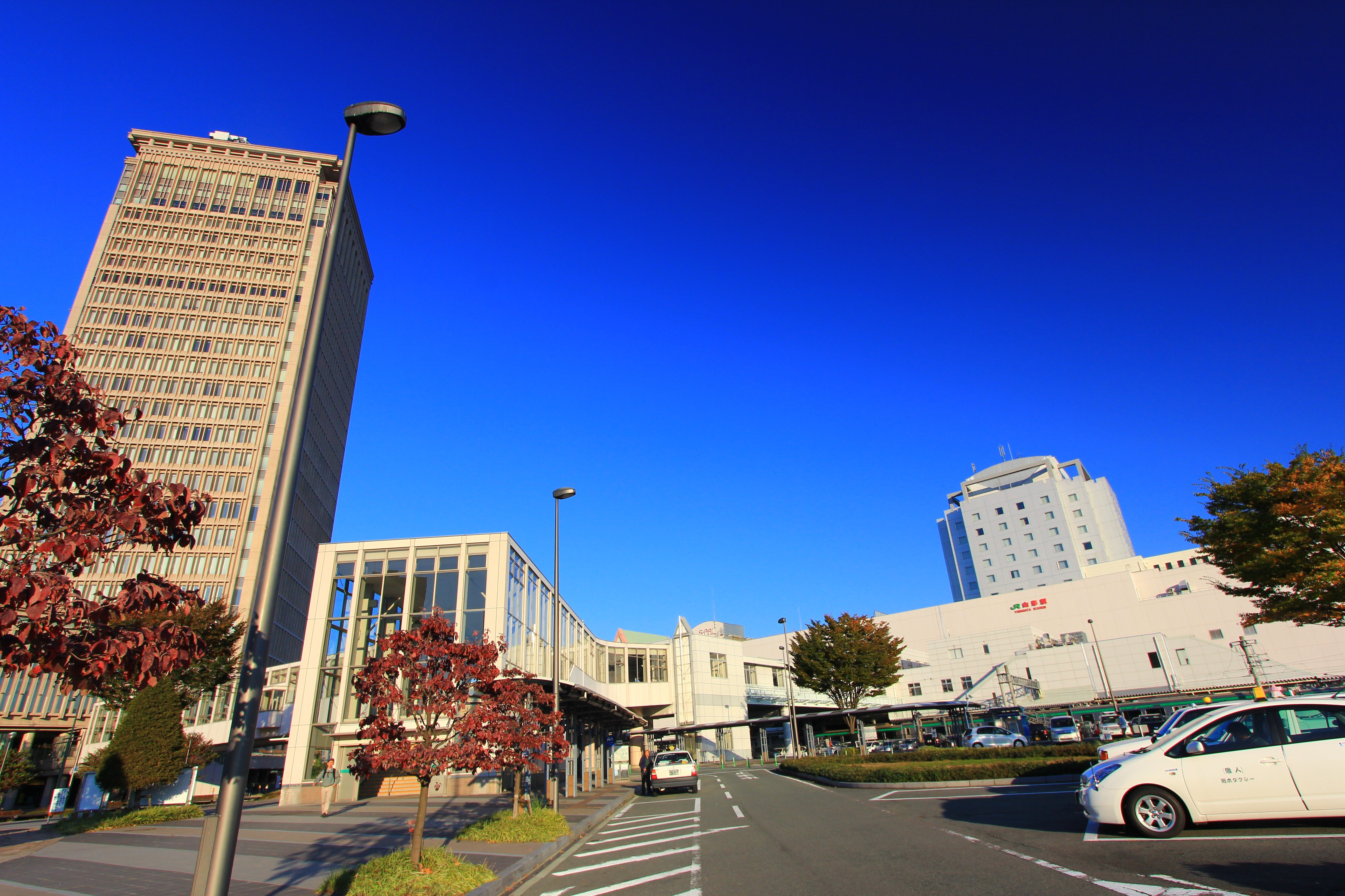 山形駅